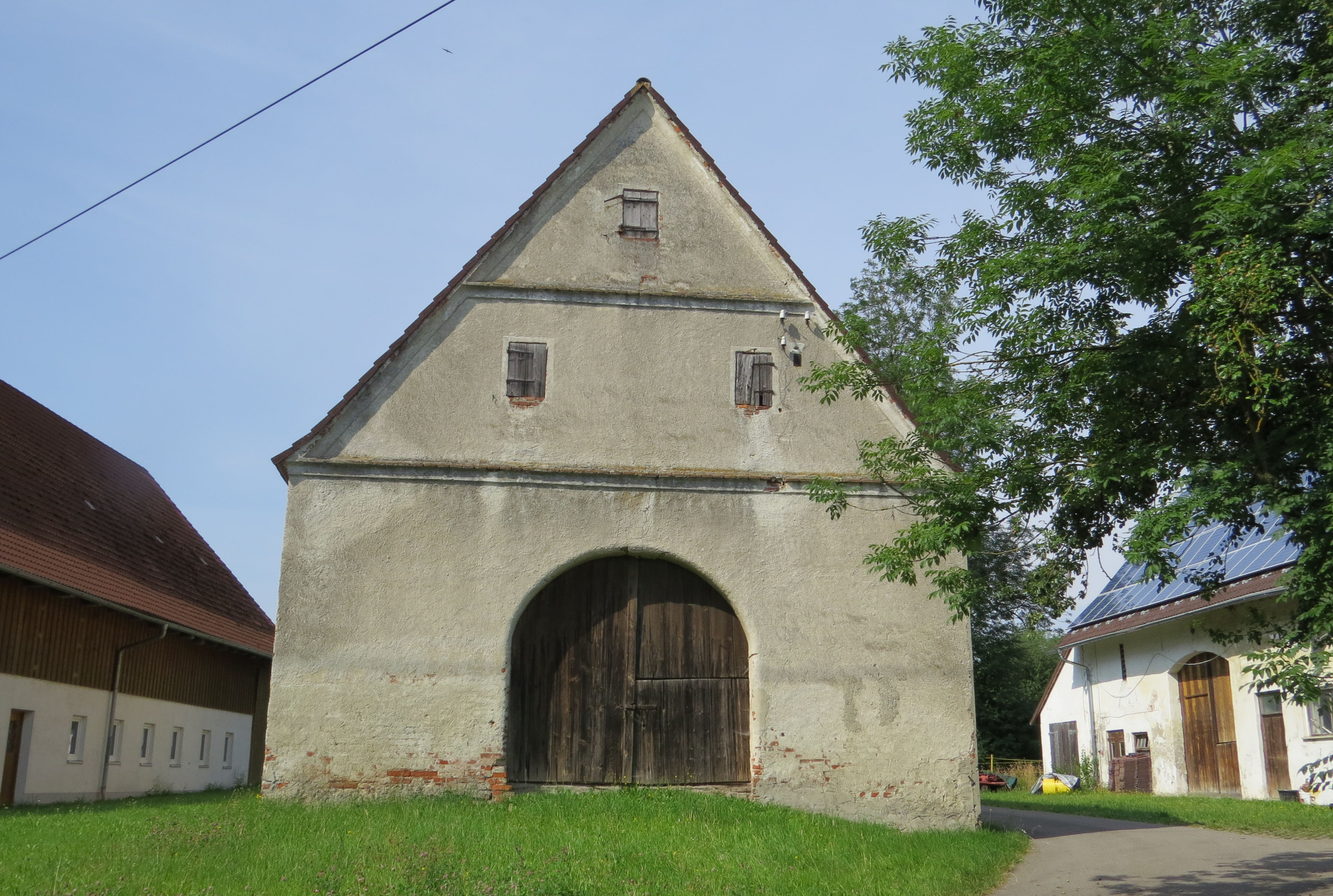 Zehentstadel in Hart, Memmingen